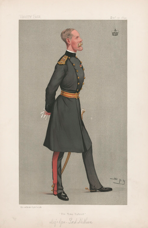 Lord Methuein